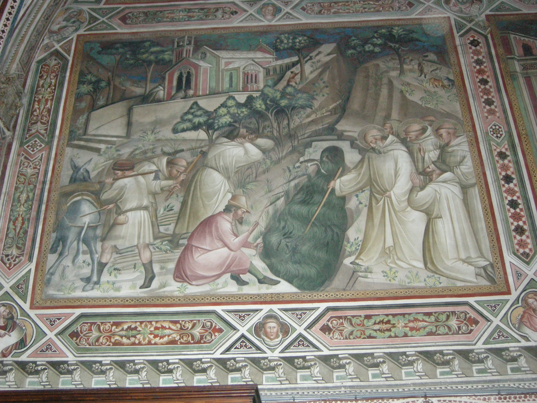 Spinello aretino, storie di san benedetto, episodio 11 benedetto fa tornare a galla un falcetto caduto a un goto